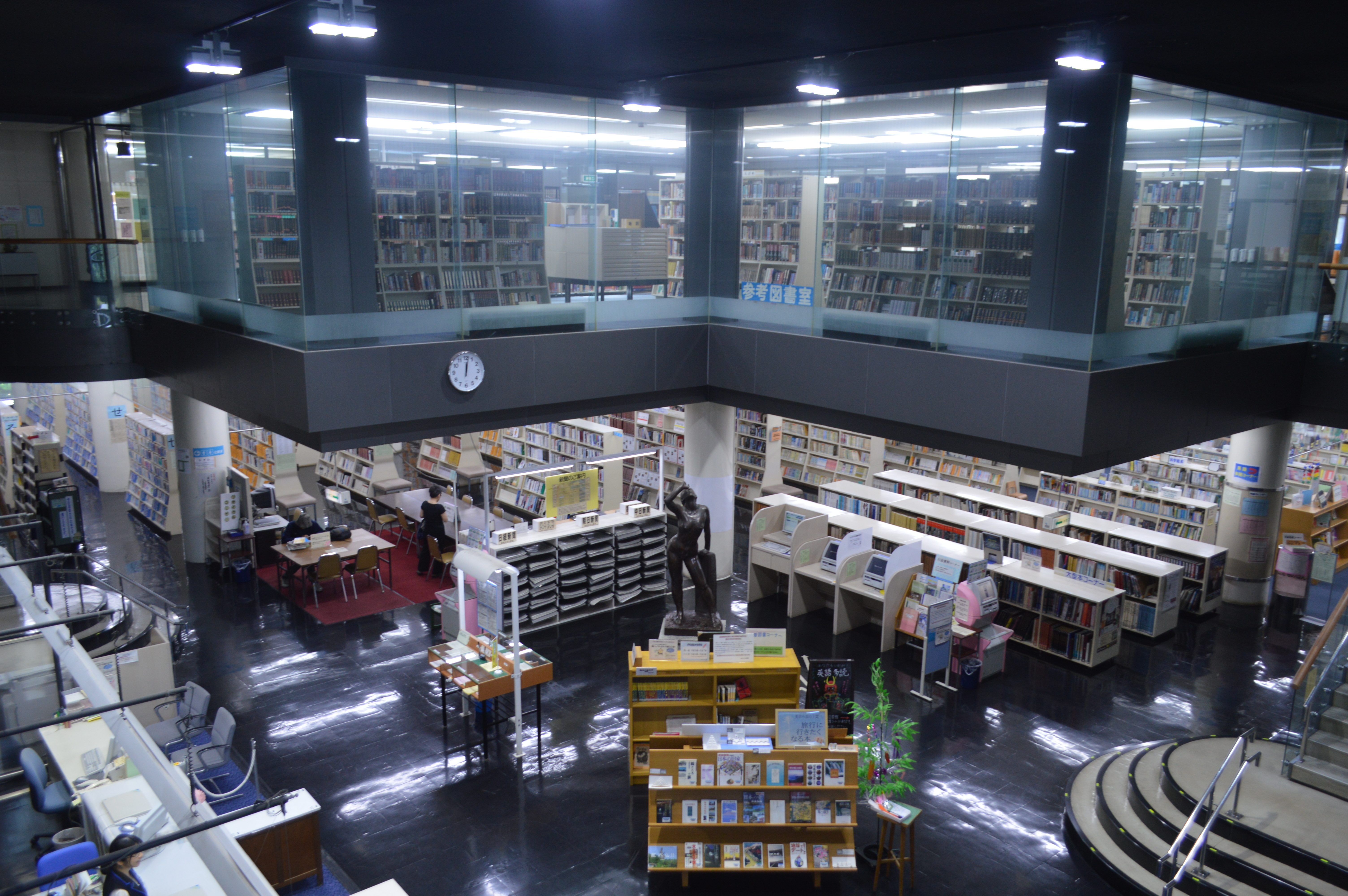 浜松市立中央図書館。2階から1階を見下ろす。